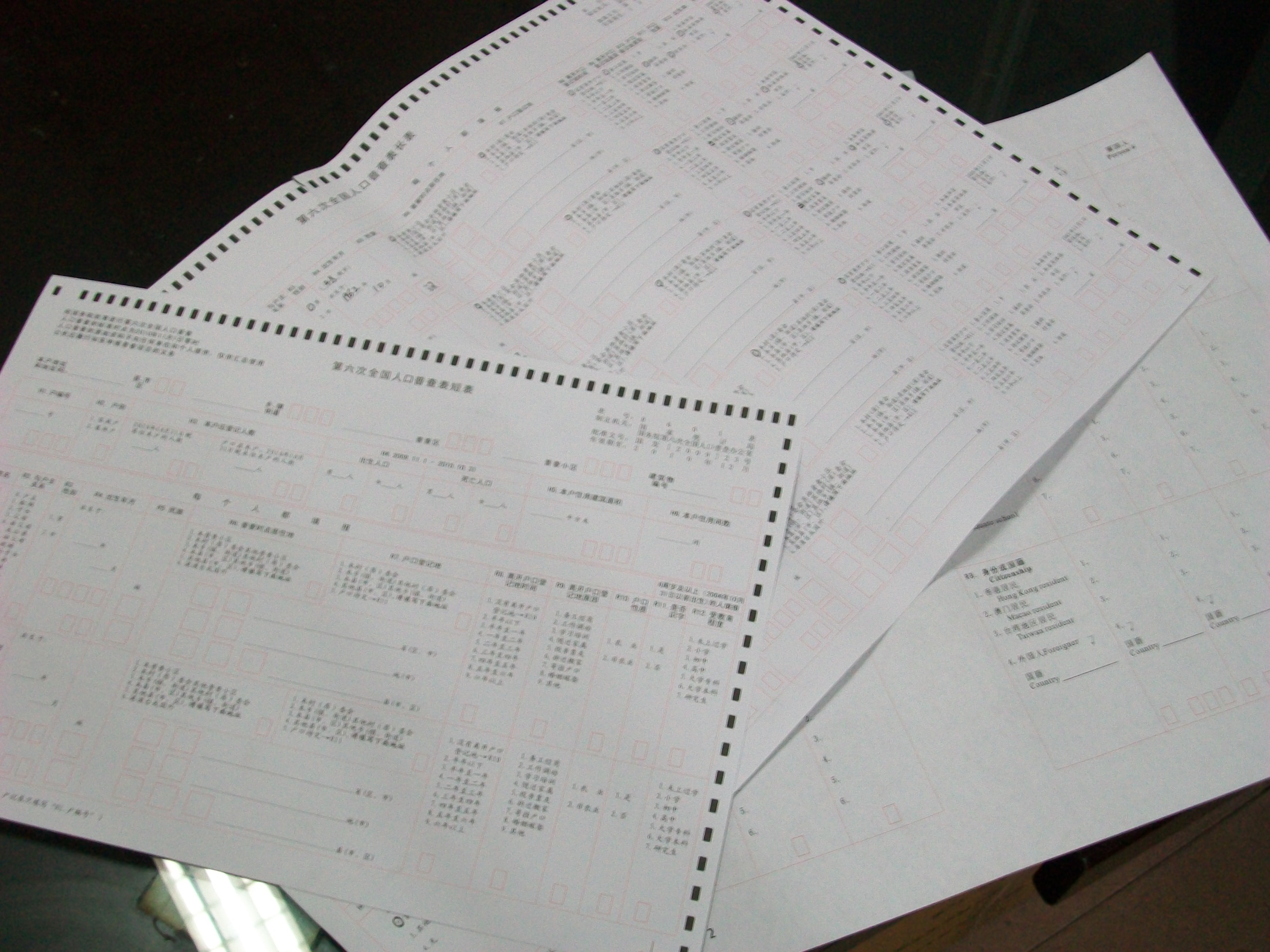 第六次人口普查的表格